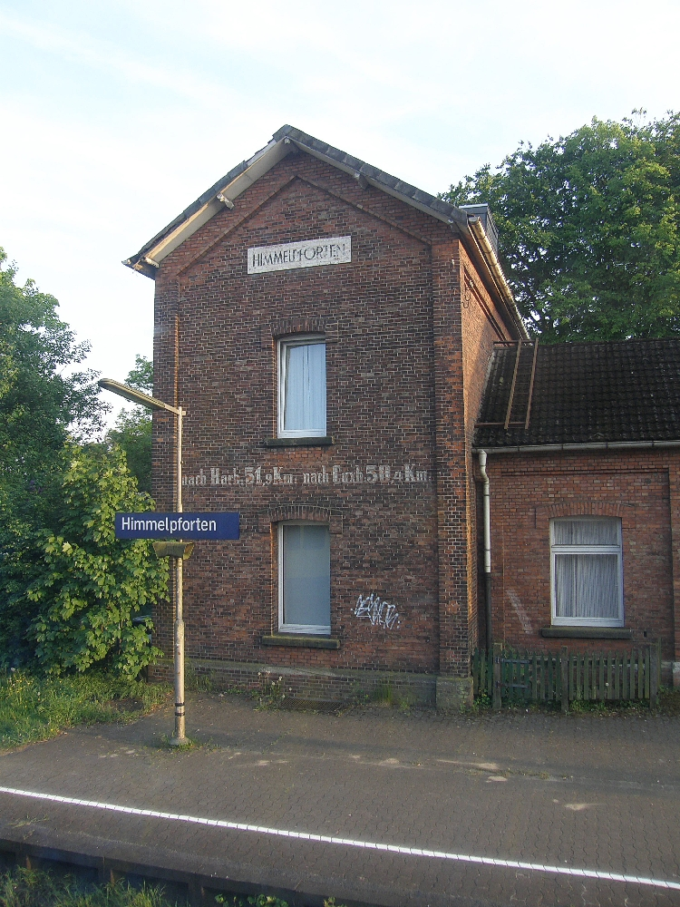 Der Bahnhof in Himmelpforten